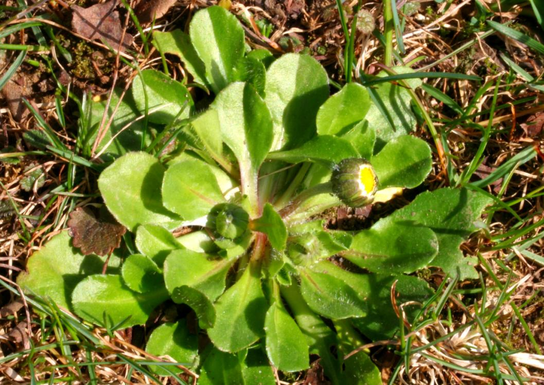 Pratolina - Località: Casteldardo, Trichiana (BL), 389 m s.l.m.